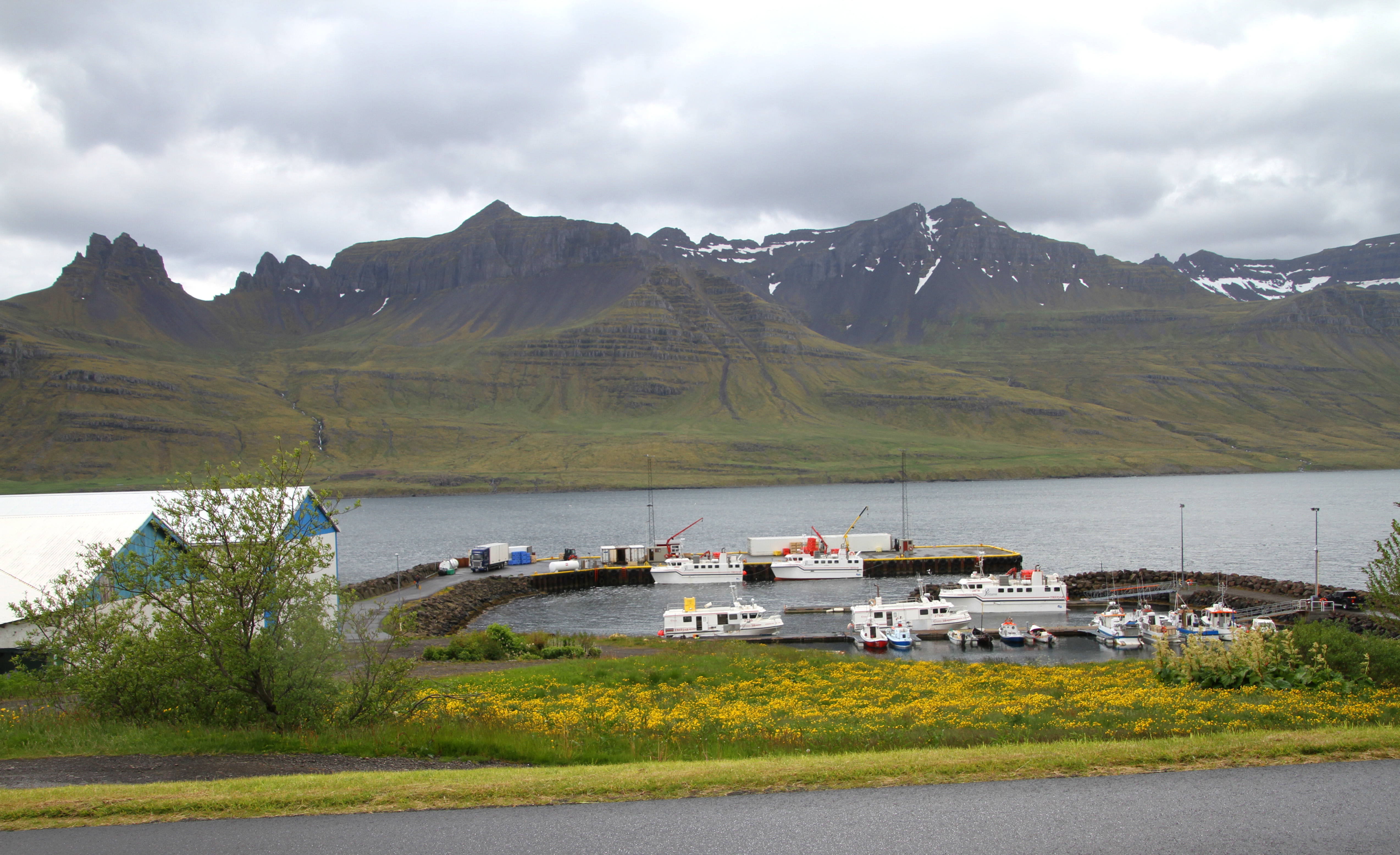 Stöðvarfjörður